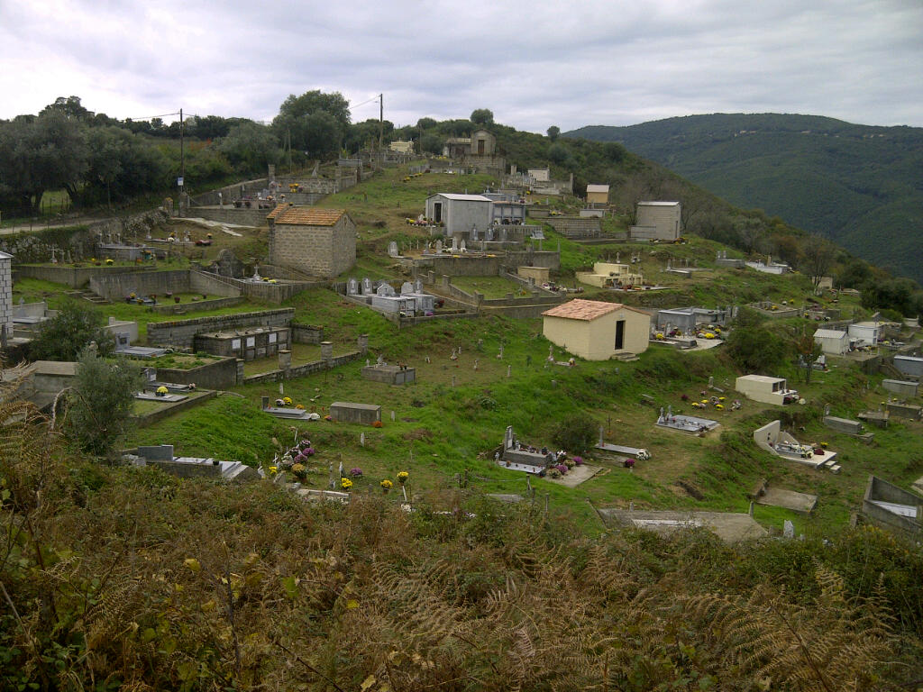 Cimetière Pila-Canale Hiver 2012 (Corsica)